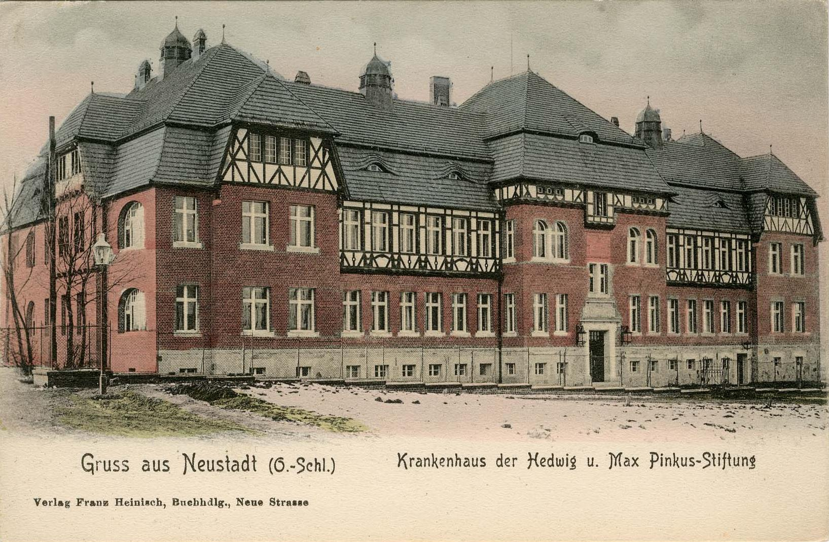 Krankenhaus der Hedwig u. Max Pinkus-Stiftung